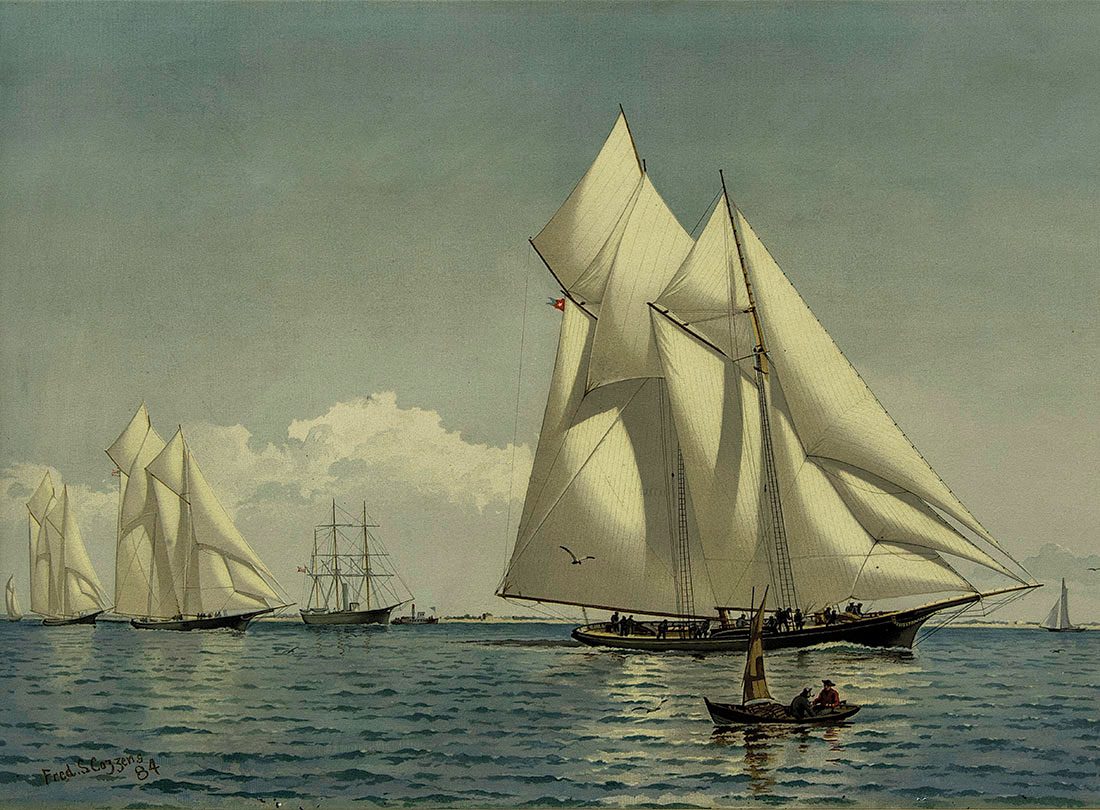 Peinture représantant les goélettes Countess of Dufferin, America, Grant et Madeleine en 1876 autour de la coupe de l'America de 1876